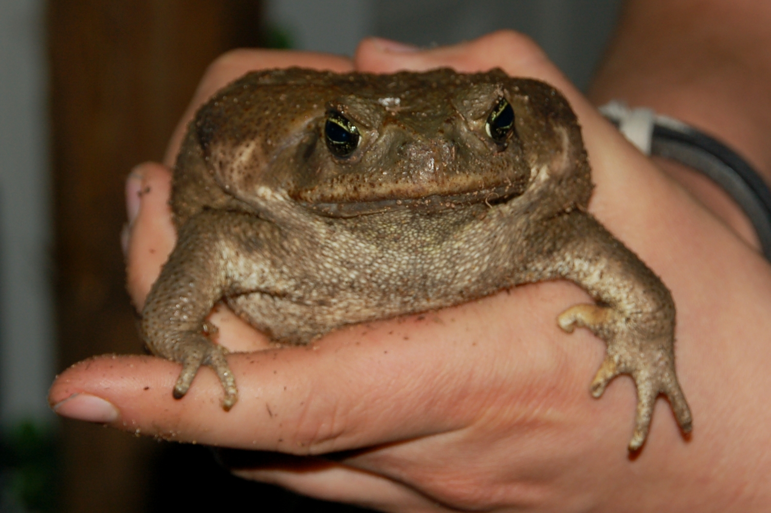 Bufo marinus, Gefangenschaft, Deutschland